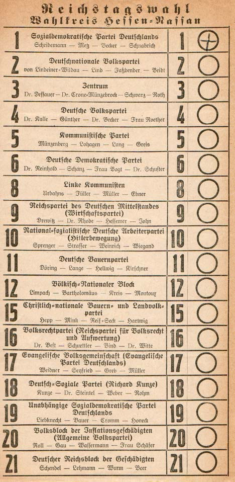 Wahlzettel aus der Weimarer Republik (Reichtagswahl 1928), GNU-FDL